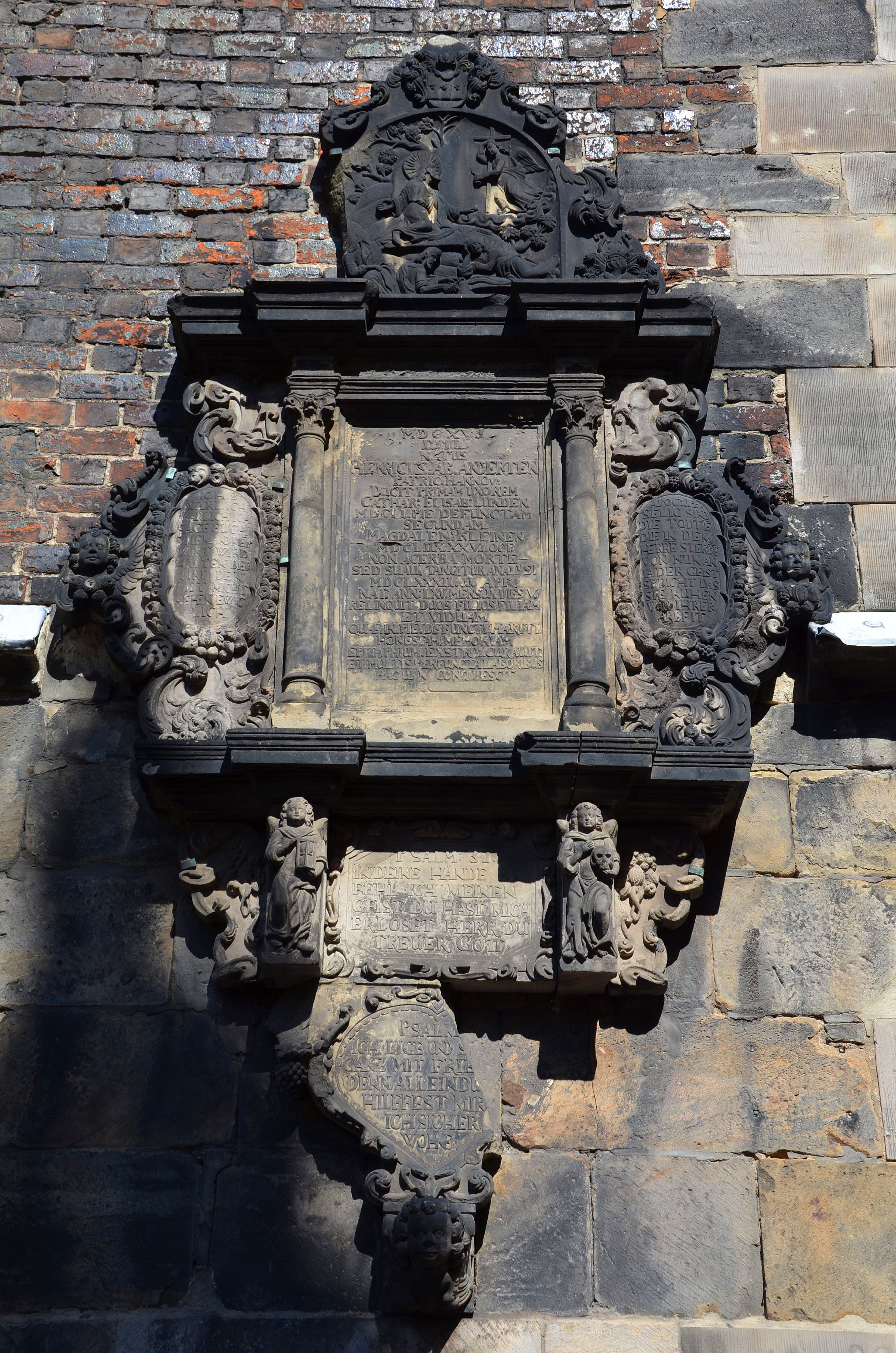 Rechts vom Portal der Marktkirche in Hannover angebrachtes Epitaph eines noch unidentifizierten Meisters für Heinrich (Hinricus) von Anderten (gestorben 1682) aus der Familie derer von Anderten, sowie der Catharina Elisabeth Lunden und Magdalena Kleinen ...